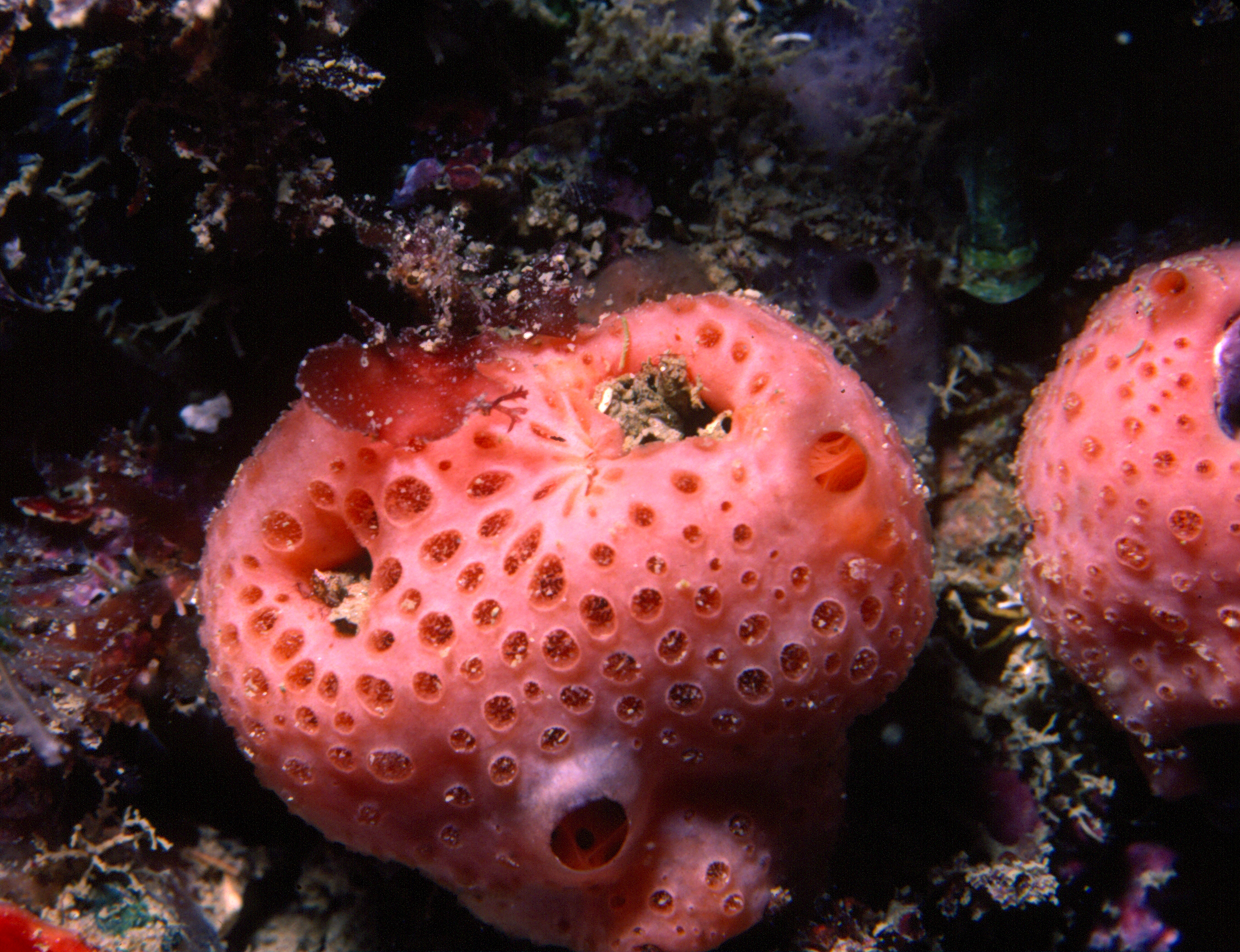 Hemimycale columella (Bowerbank, 1874) - Banyuls-sur-Mer : 08/1983